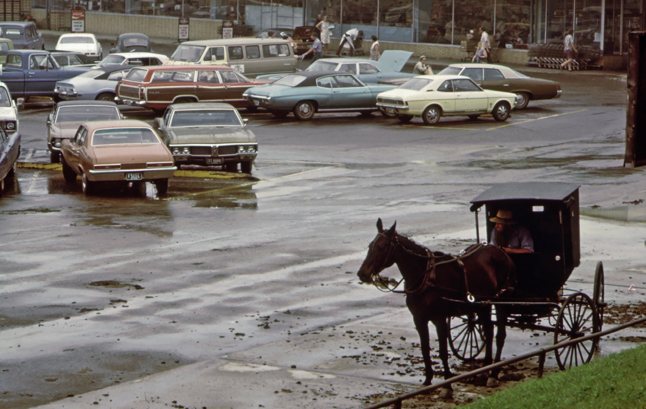 Amischer Kutscher auf einem Supermarkt-Parkplatz in Middlefield, Ohio